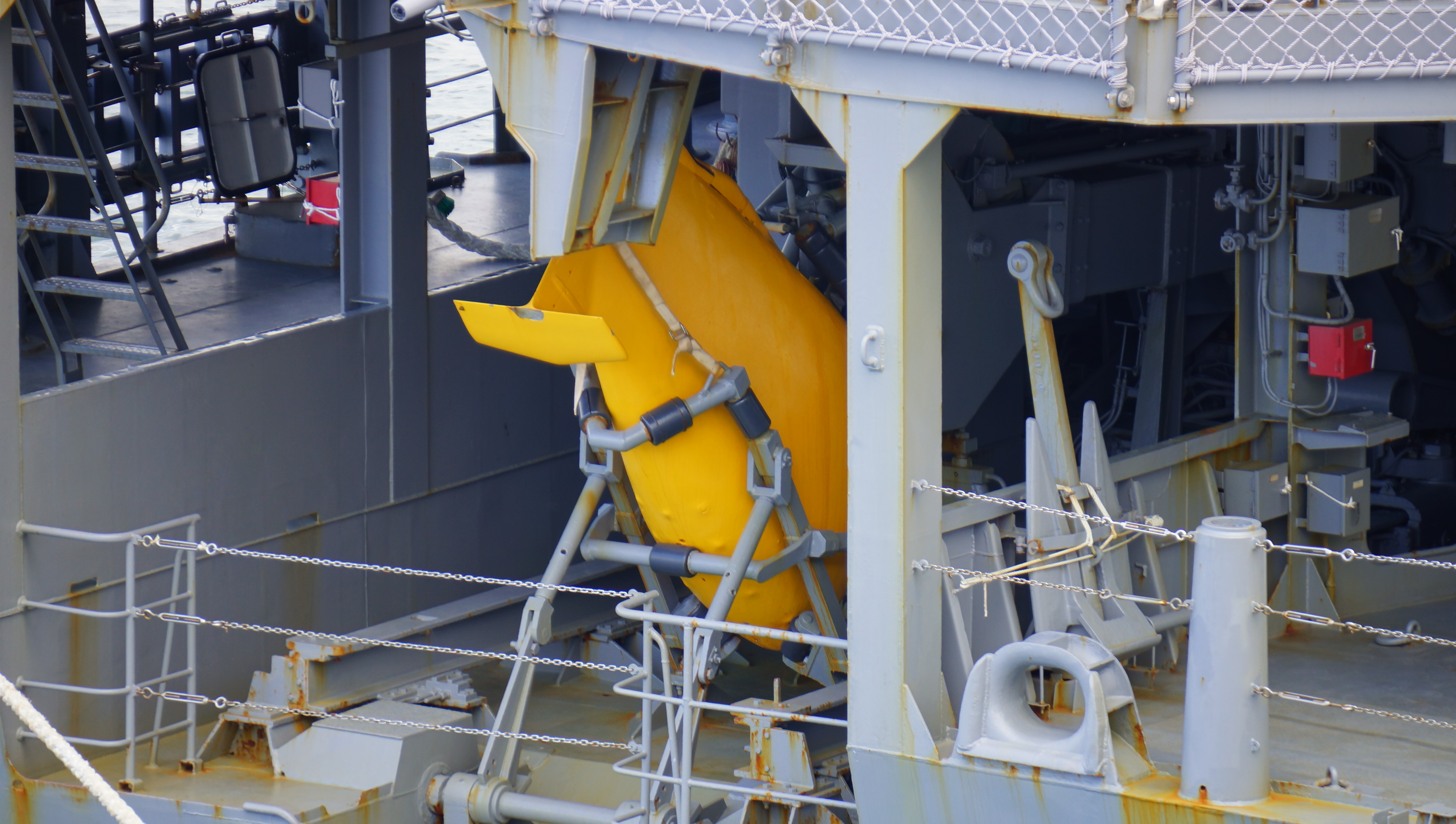 海上自衛隊 護衛艦くらま（DDH-144） SQR-18A曳航式ソナー。 13年10月27日 神戸港にて。